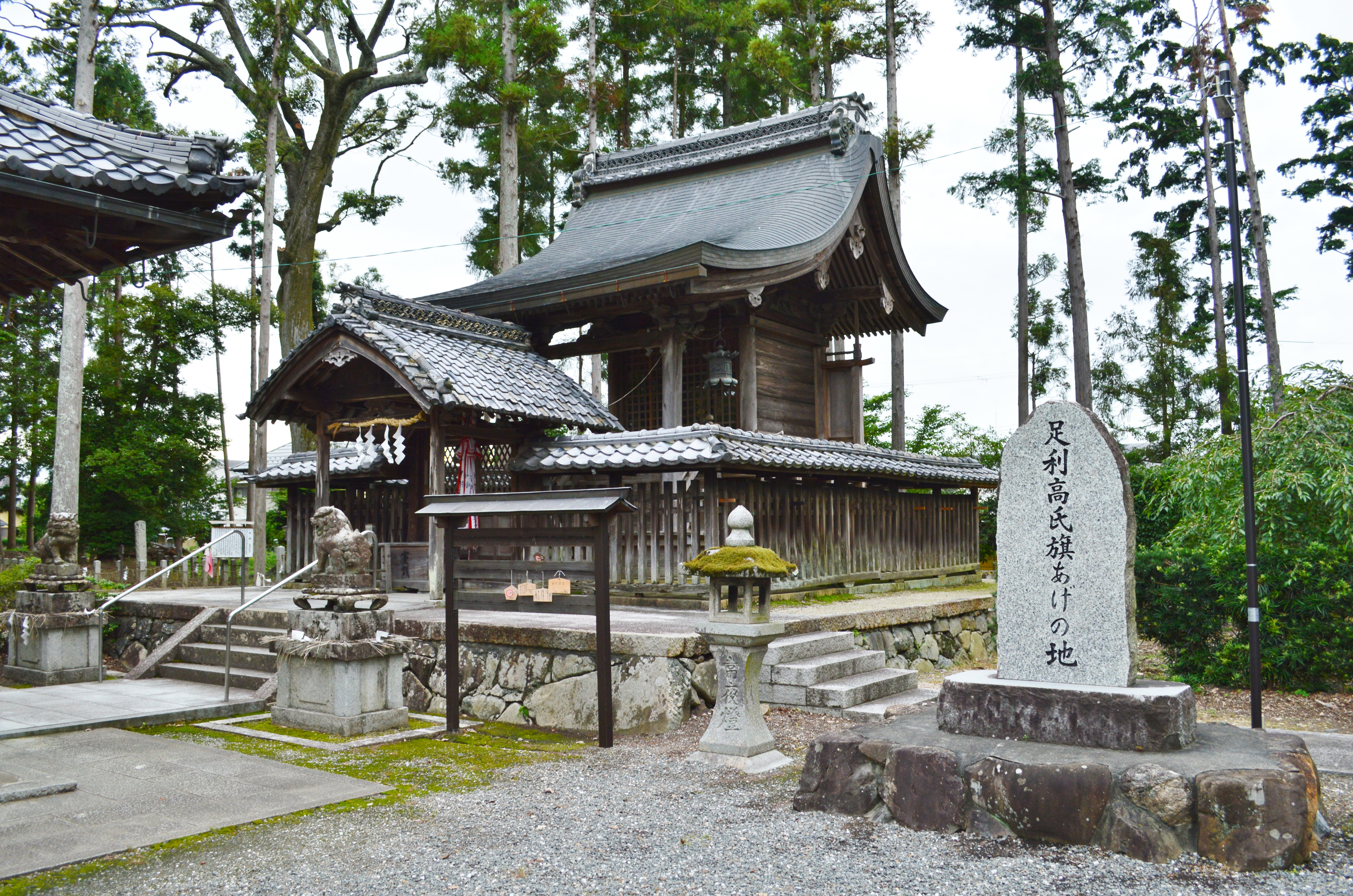 篠村八幡宮 本殿